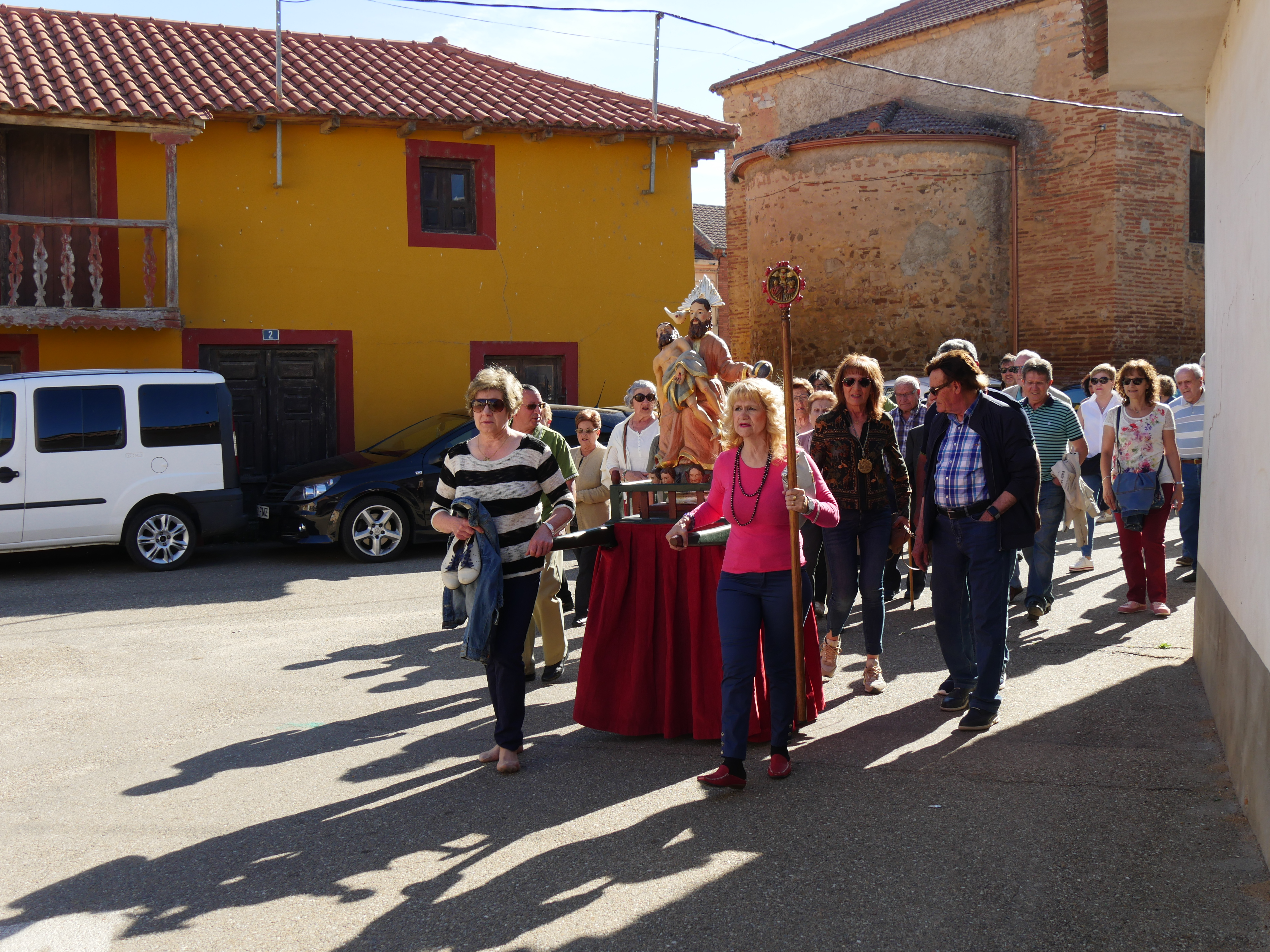 Аҧсшәа: Trinidad camarzana